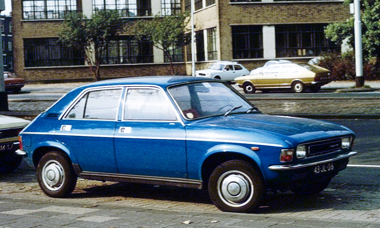 Austin Allegro in Rotterdam